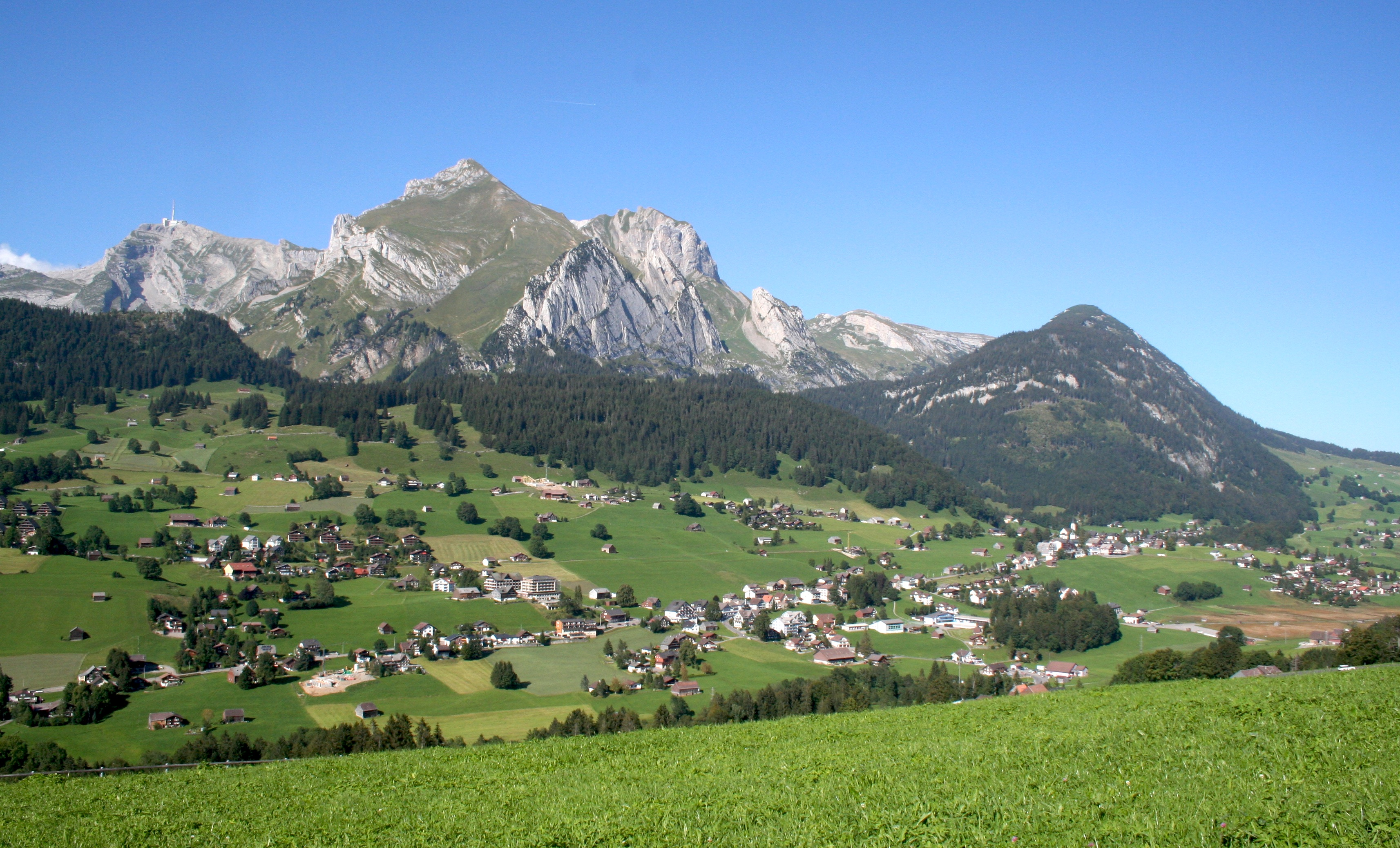 Wildhaus SG